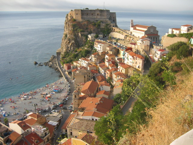 Scilla - Panorama